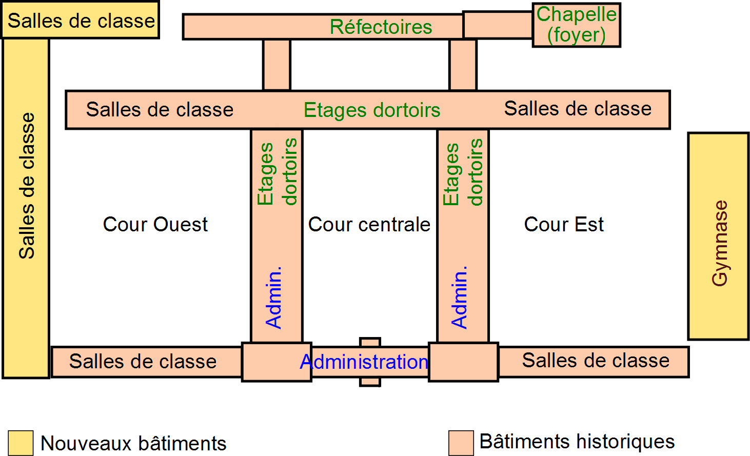 Plan du lycée Berthollet en 1970 - Annecy, France